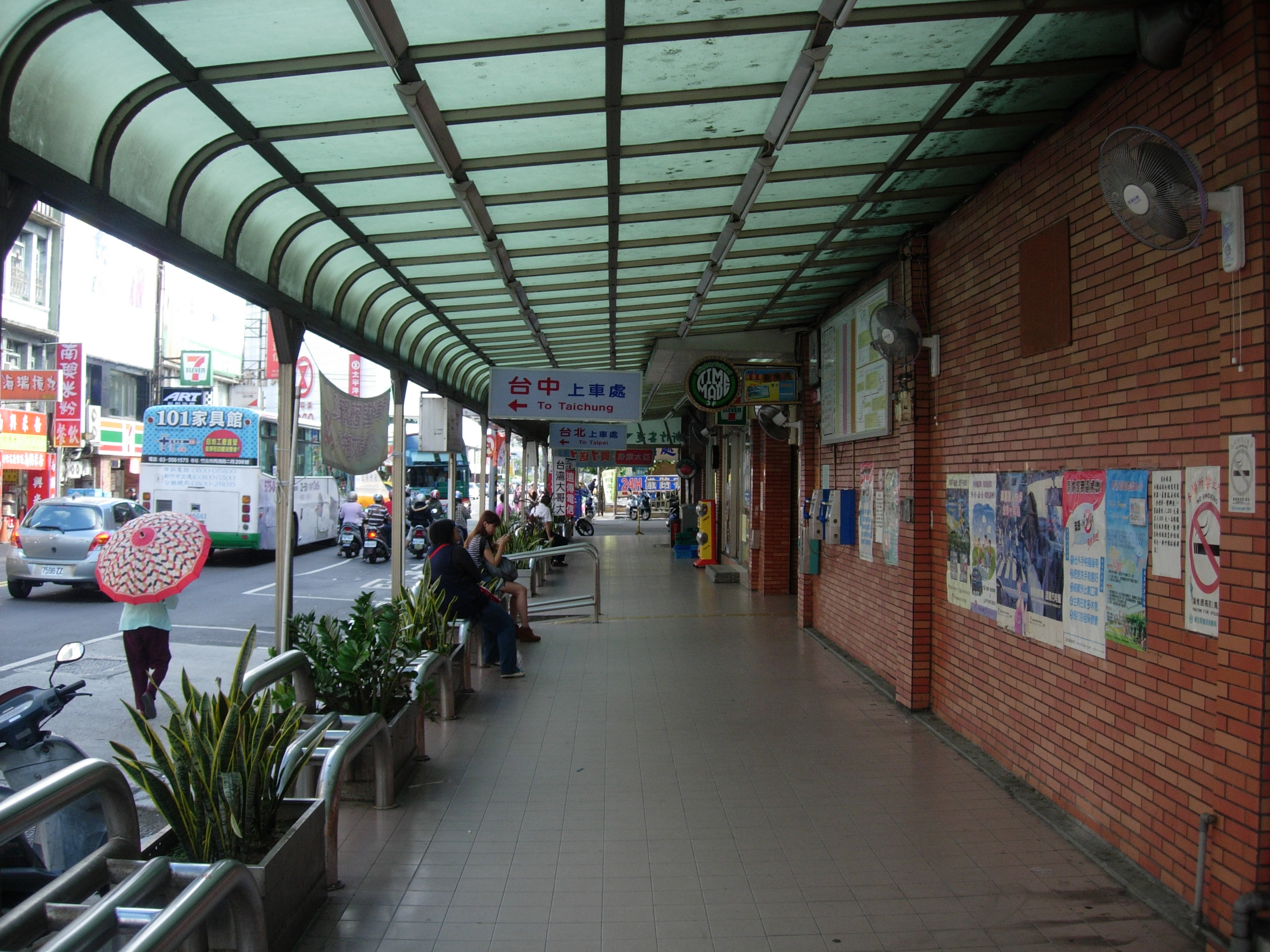 中文（台灣）: 新竹客運新竹總站月台2